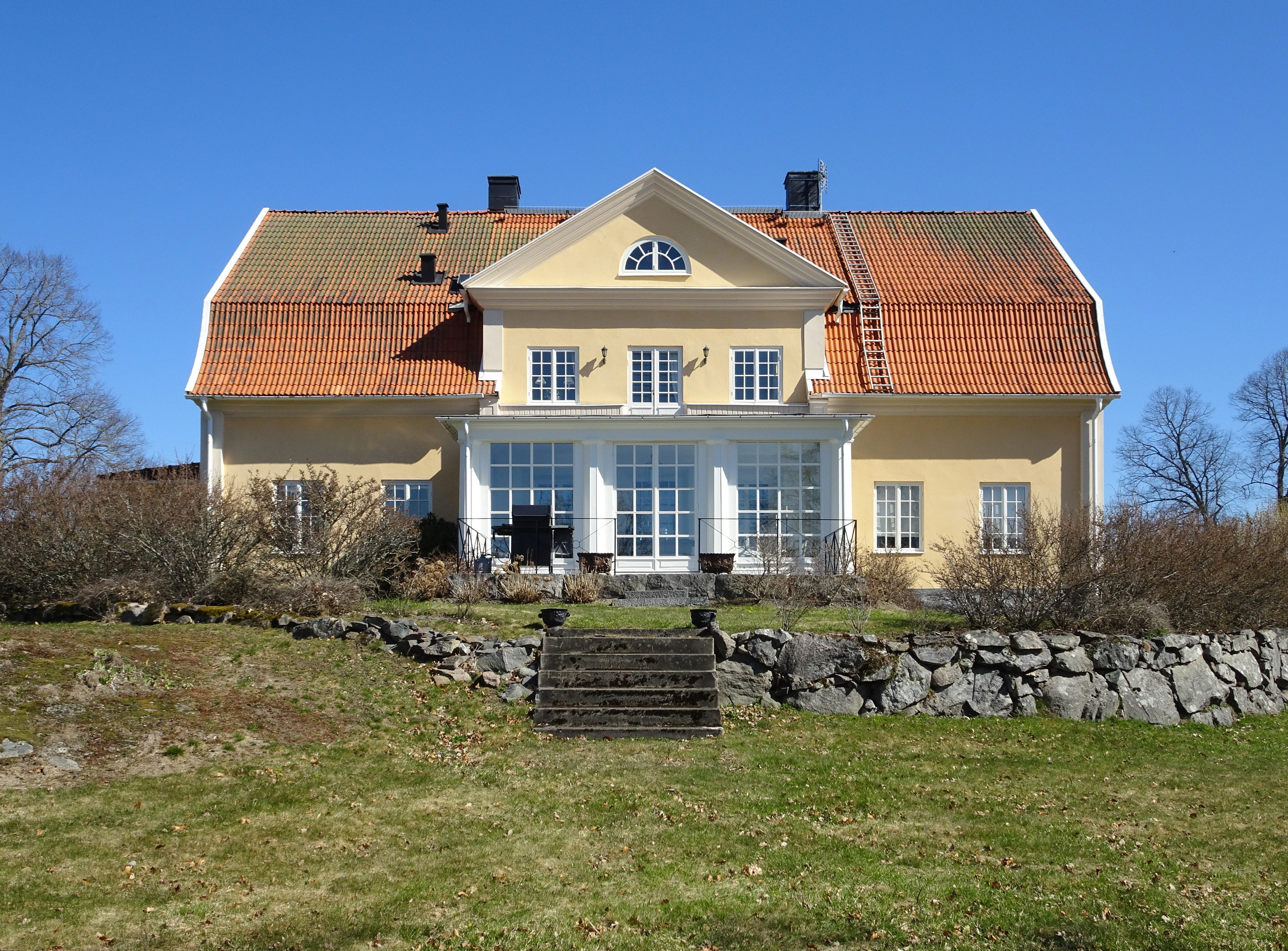 Jordanstorps säteri, huvudbyggnad